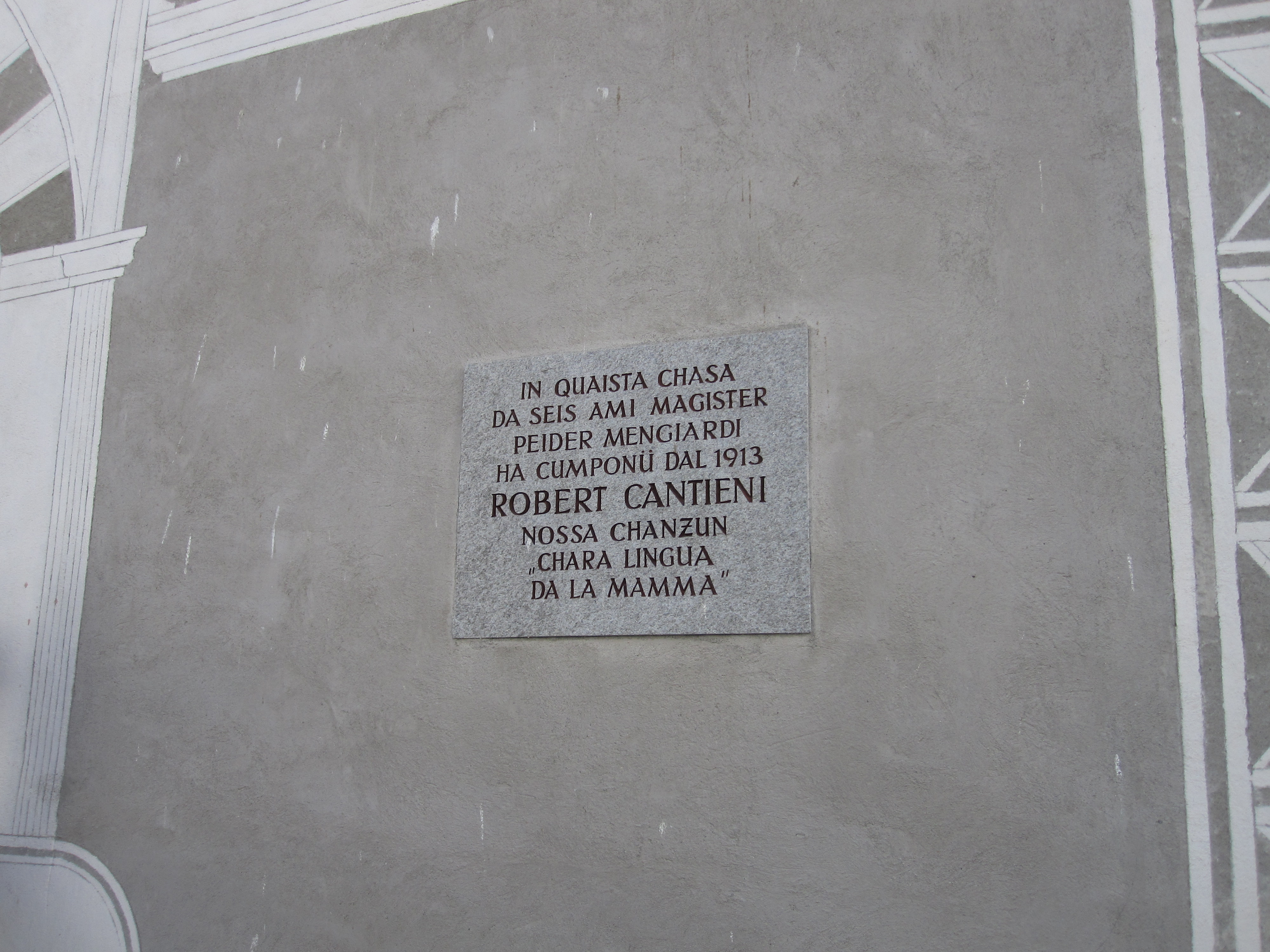 Gedenkinschrift am Ardezer Haus, in dem Robert Cantieni das rätoromanische Volkslied "Chara lingua da la mamma" komponierte